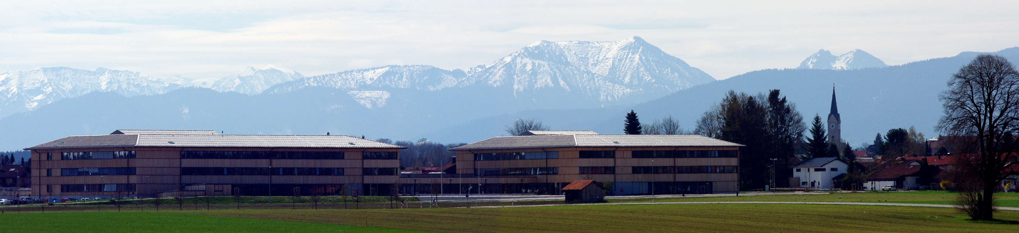 Gymnasium und FOS im Norden Holzkirchens (Blick nach Süden)